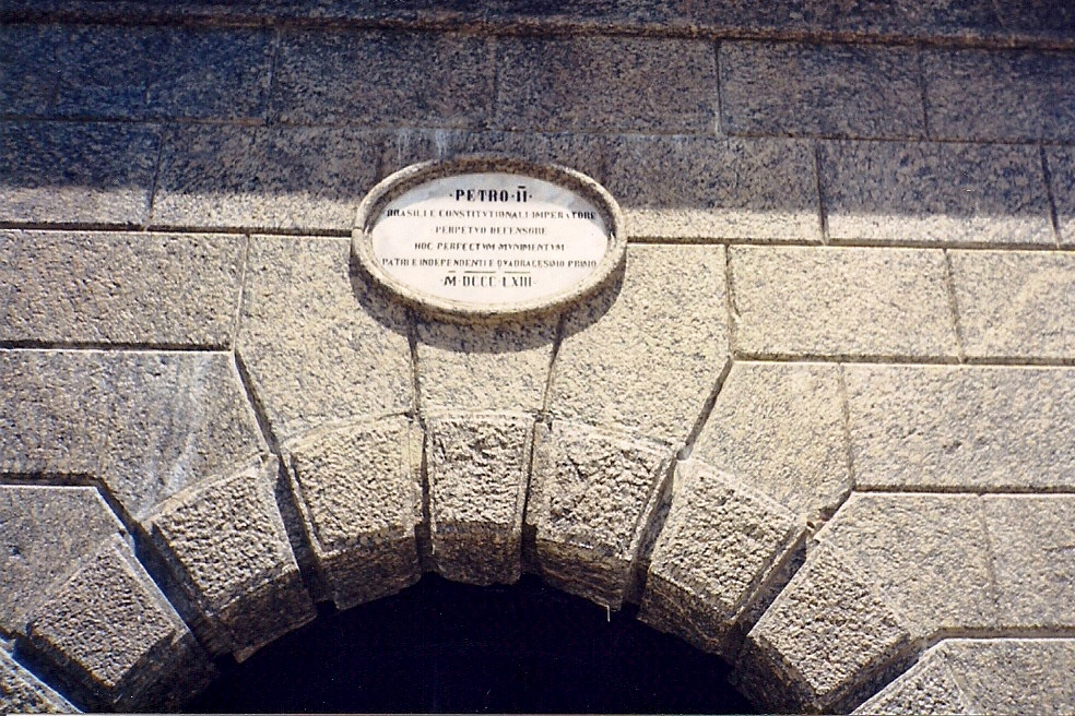 Forte de São Domingos de Gragoatá, Niterói, RJ, Brasil: cartela.